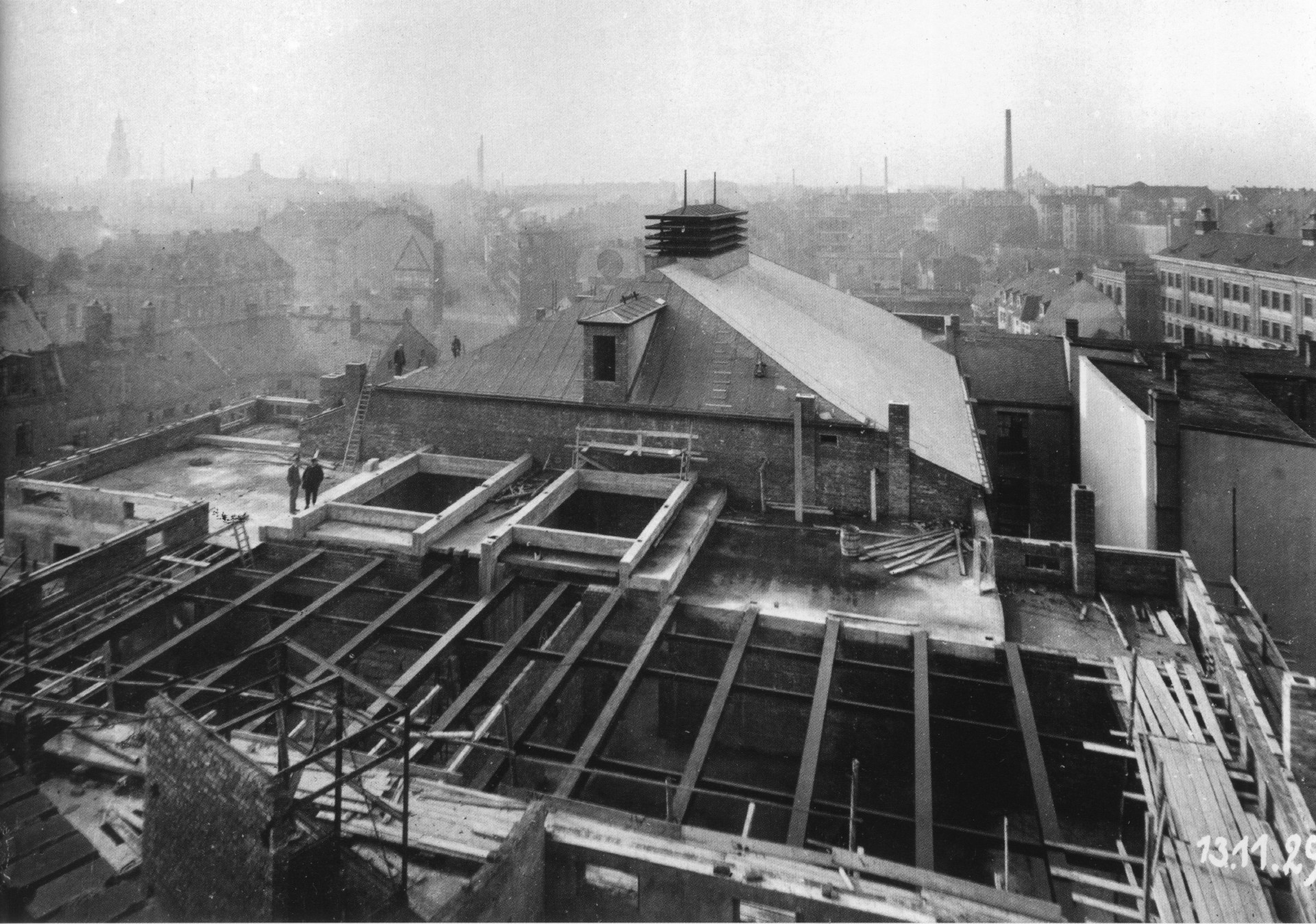 Baustelle Westbad, Marktstraße 2-6, Architekt Hubert Ritter.